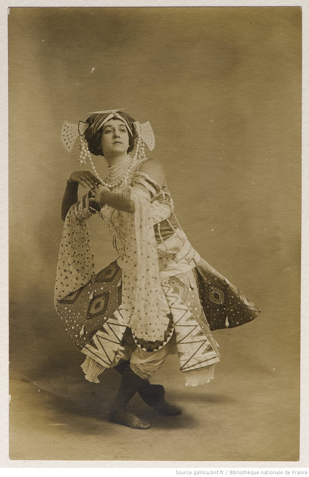 Le Dieu bleu, Tamara Karsavina (dans le rôle de la jeune fille); photographie de Waléry (Charles Auguste Varsavaux), photographe officiel pour la Saison Russe parisienne de 1912